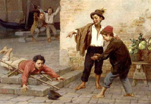 Una disgrazia a Venezia, olio su tela, 49.5 x 71 cm, collezione privata